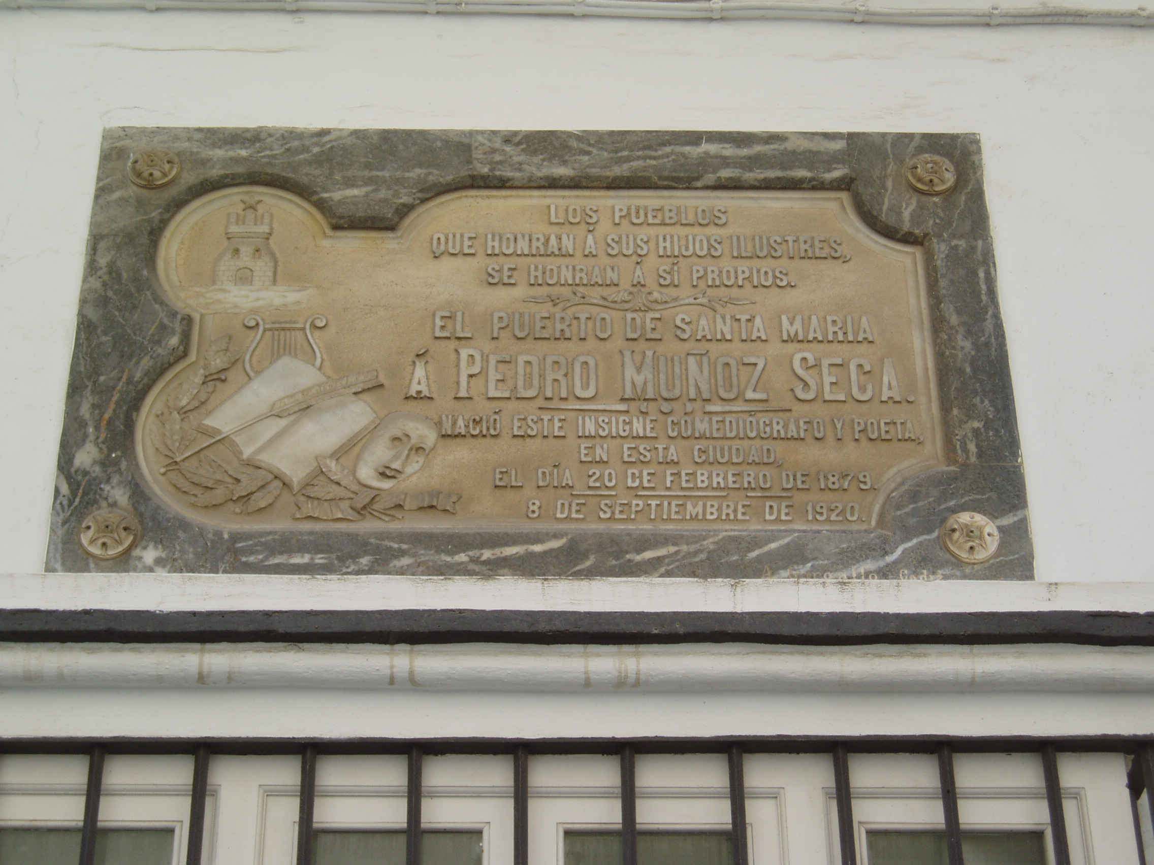 Placa conmemorativa en El Puerto de Santa María. Homenaje al dramaturgo Pedro Muñoz Seca.